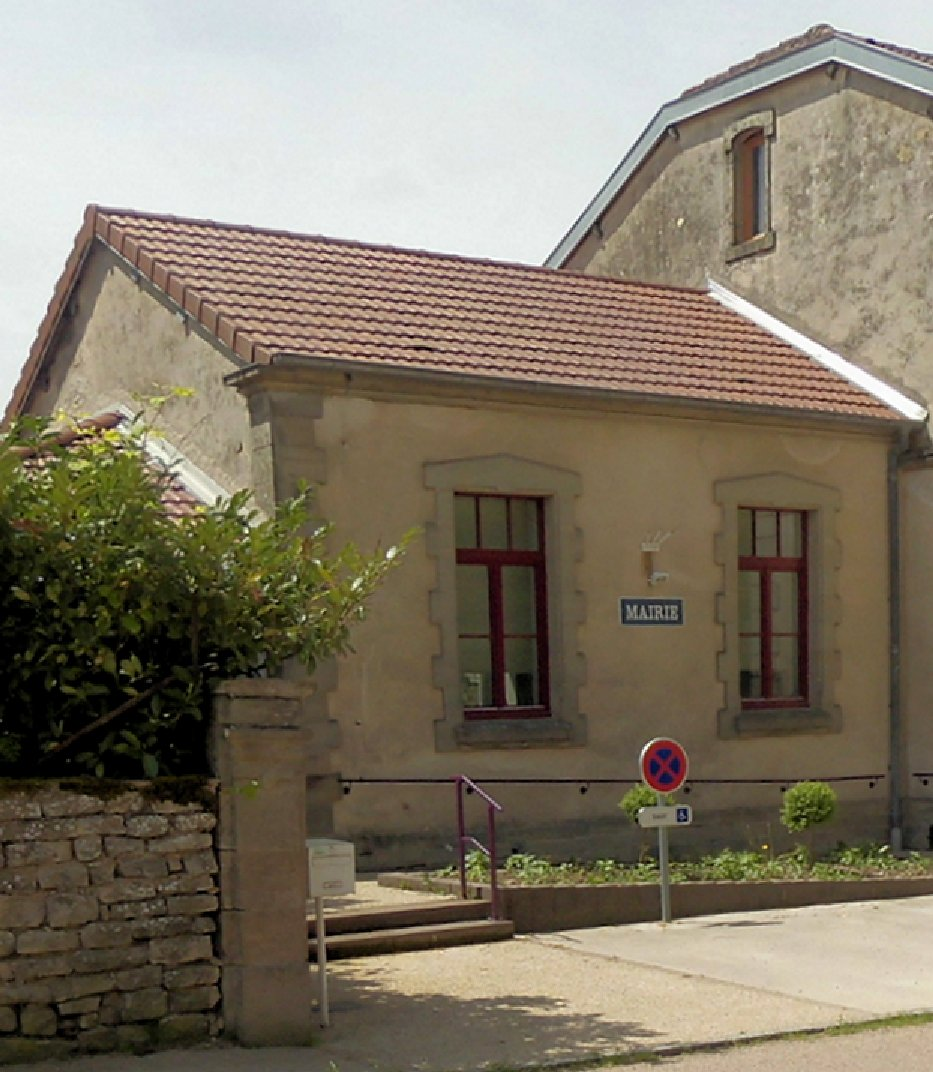 La mairie-école de Gemmelaincourt